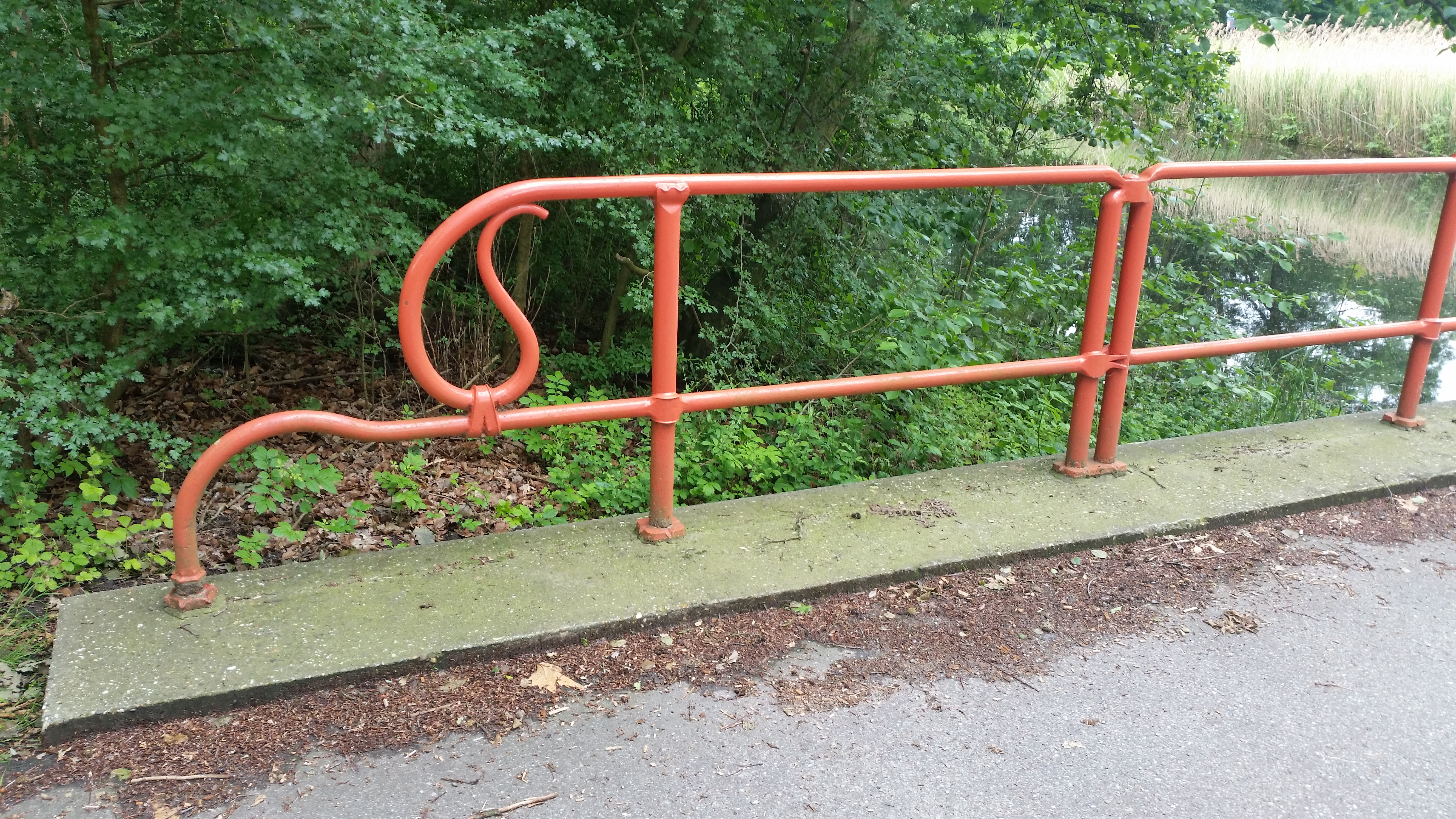 Uiteinde van leuning van Brug 554 (in Amsterdam)